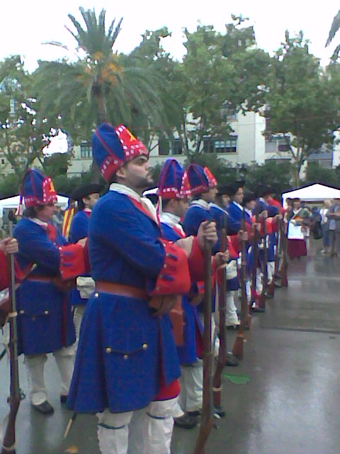 Secció del Regiment de la Diputació del General, formada a l'Arc de Triomf (Barcelona), l'11 de setembre de 2013, amb els mangraners en primer terme